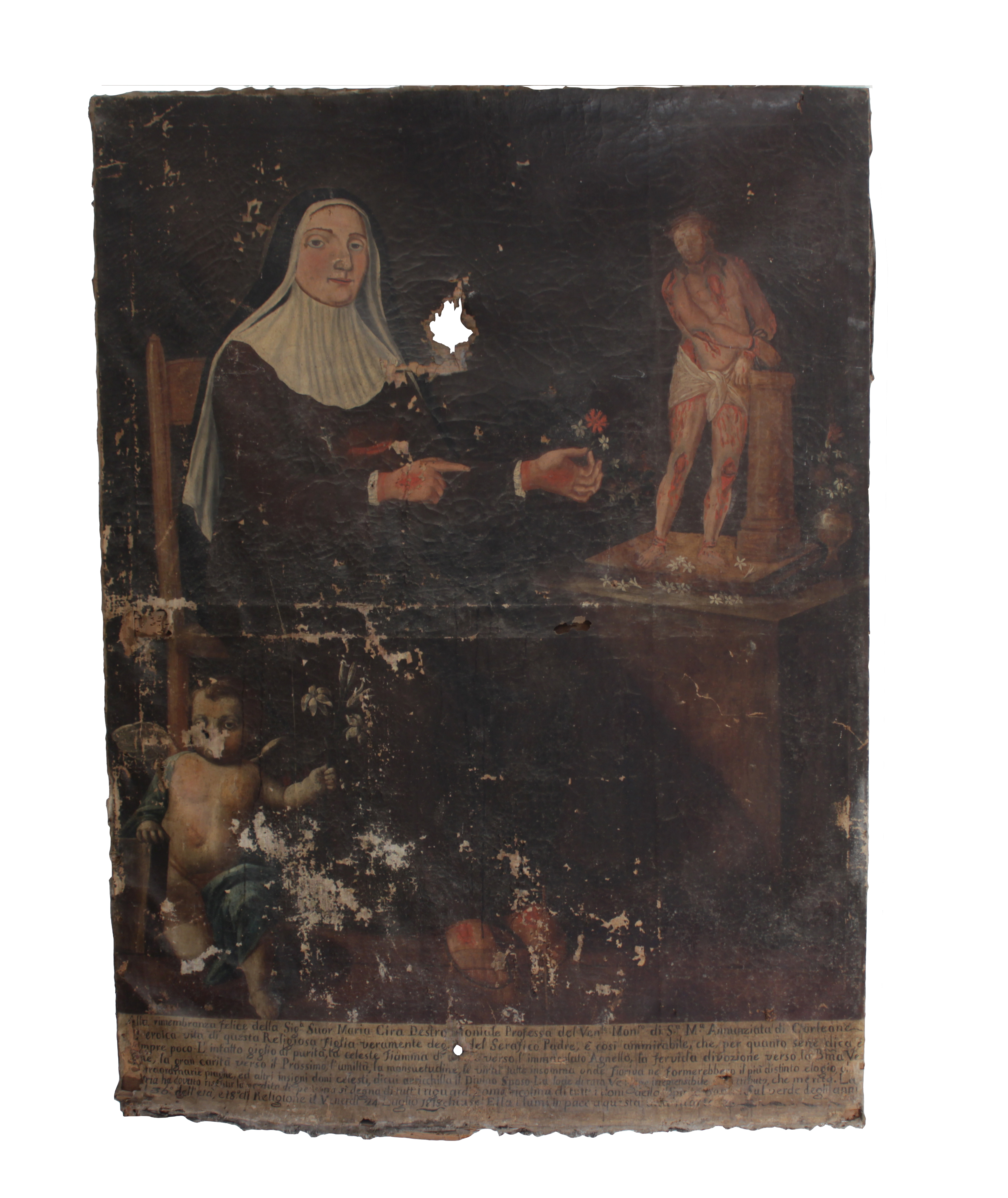 Raffigura una mistica religiosa clarissa morta nel 1818 in fama di santità.